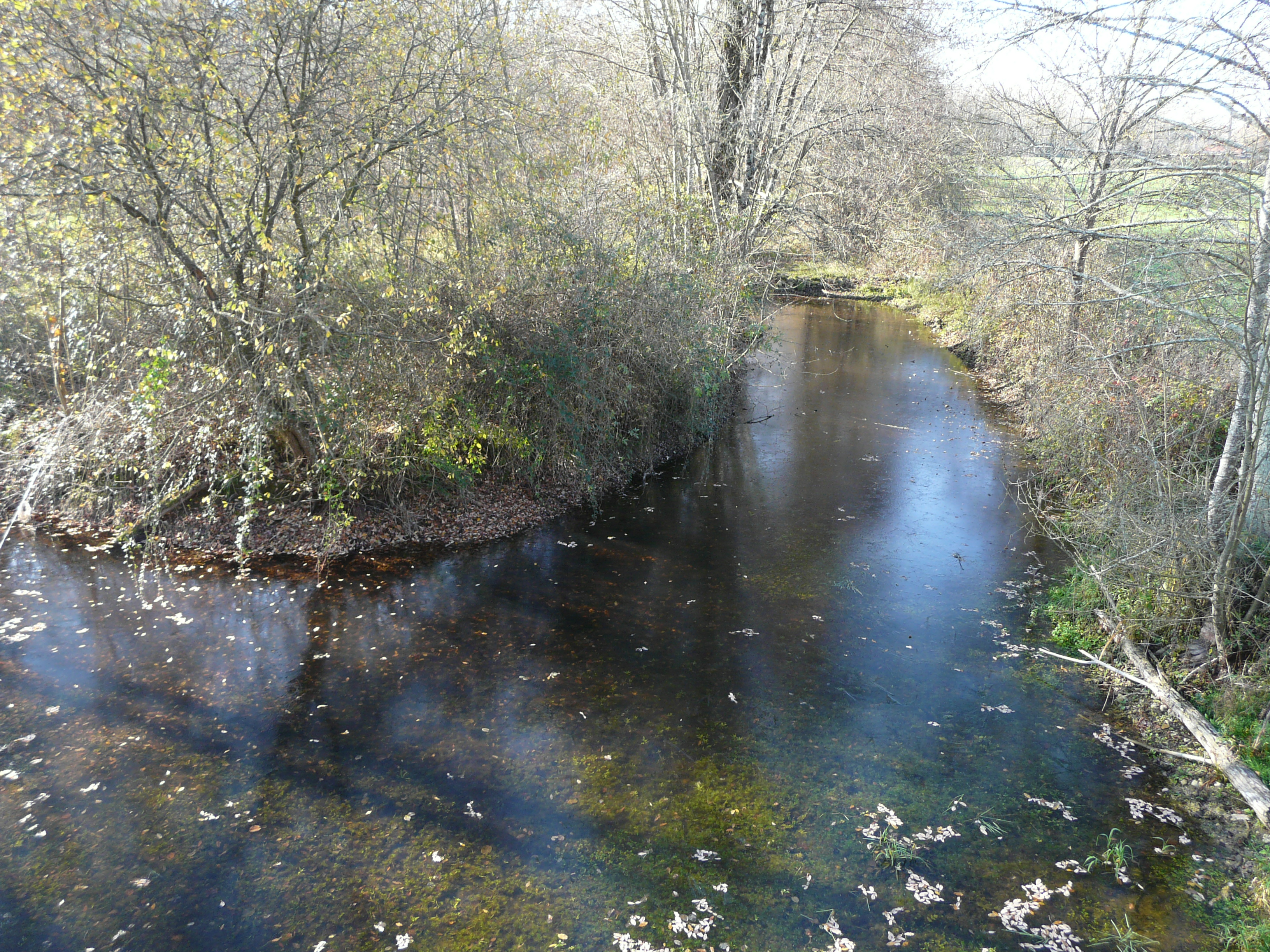 Le Vern en aval du pont de la route départementale 107, lieu-dit le Pont de Bruc, Grignols, Dordogne, France.